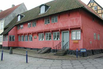 Her blev søhelten Peter Willemoes født - Østergade 36 i Assens